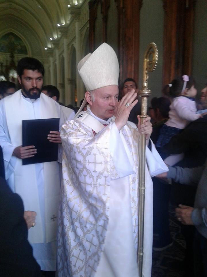 Monseñor Ducasse asume como Arzobispo de Antofagasta 26 de Agosto de 2017